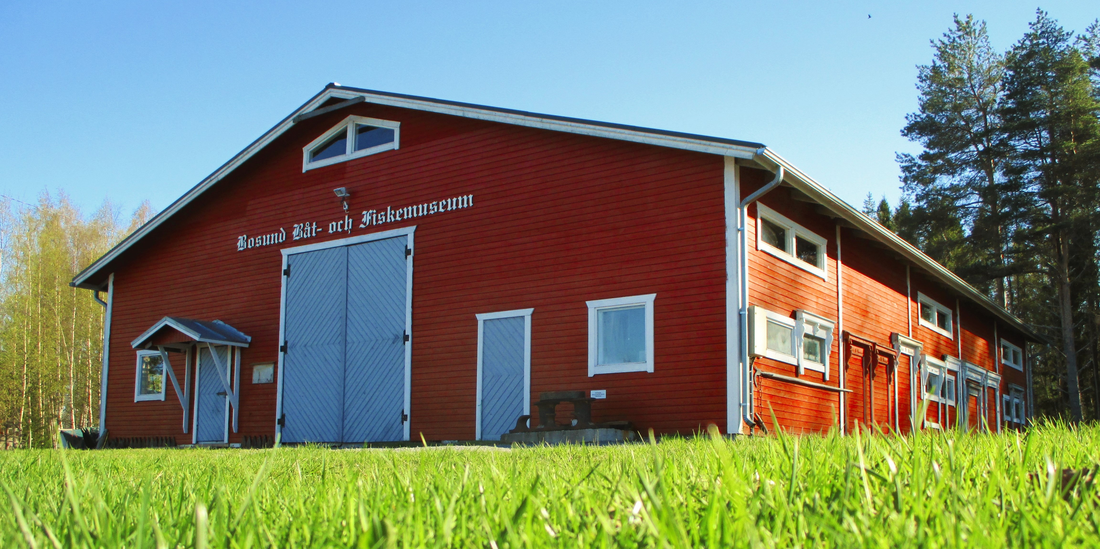 Huvudbyggnaden på museiområdet